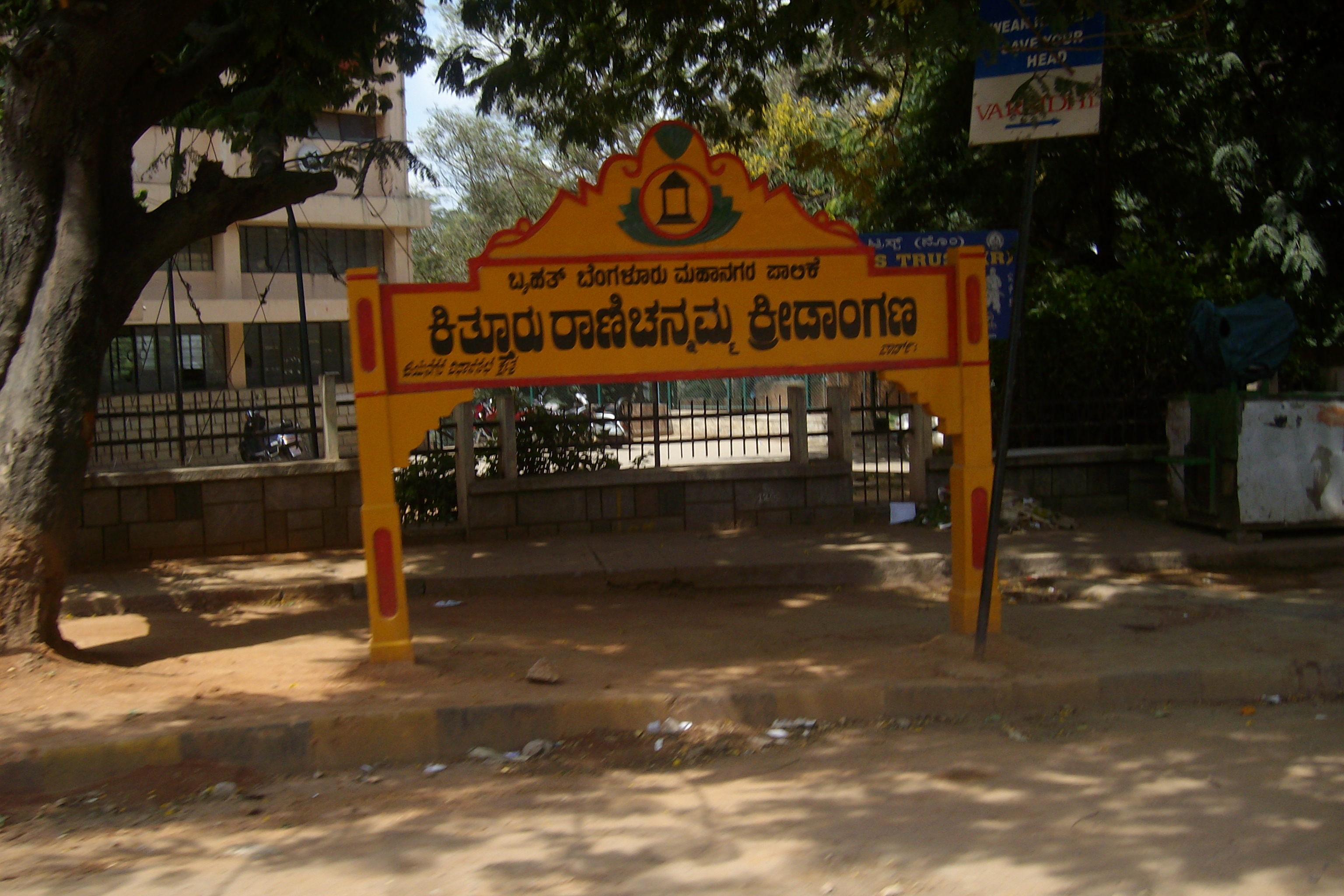 Kittur Rani chennama